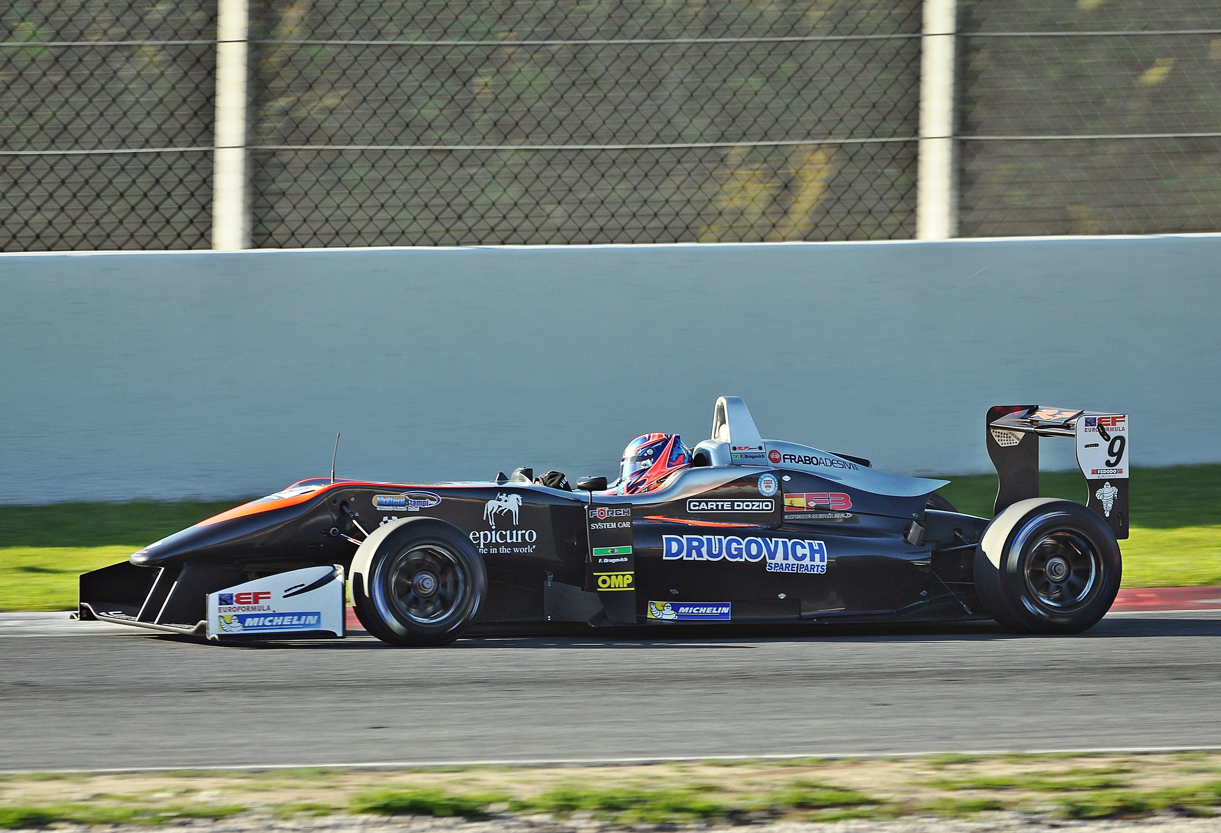 Circuito de Barcelona 2017